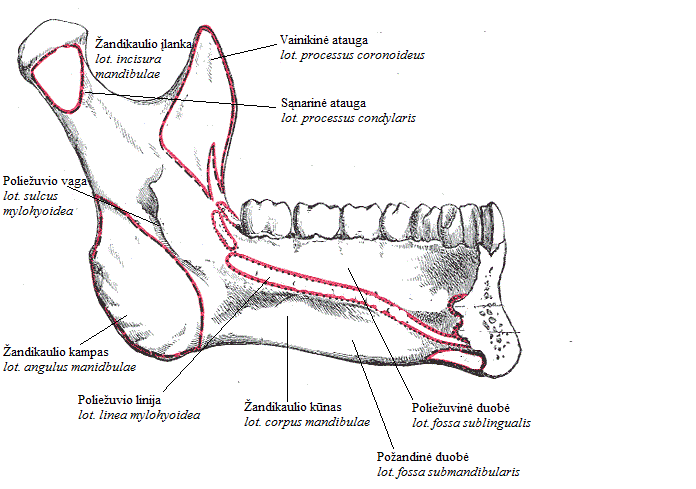 Apatinis žandikaulis